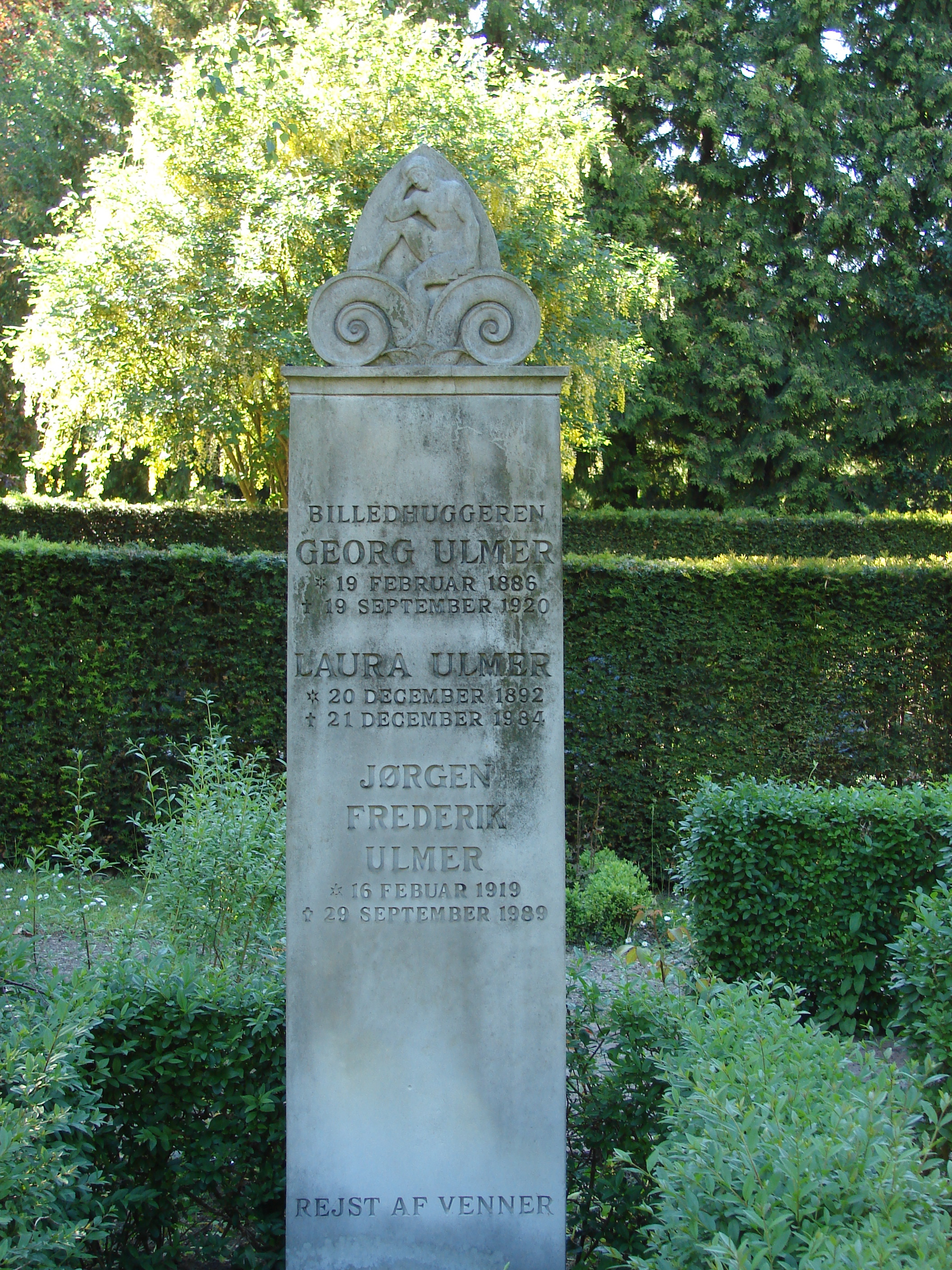 Gravmæle til billedhugger Georg Ulmer (1886-1920) og hans familie.